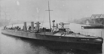 Fotografía del Destructor ARA Santa Fe, en 1896.